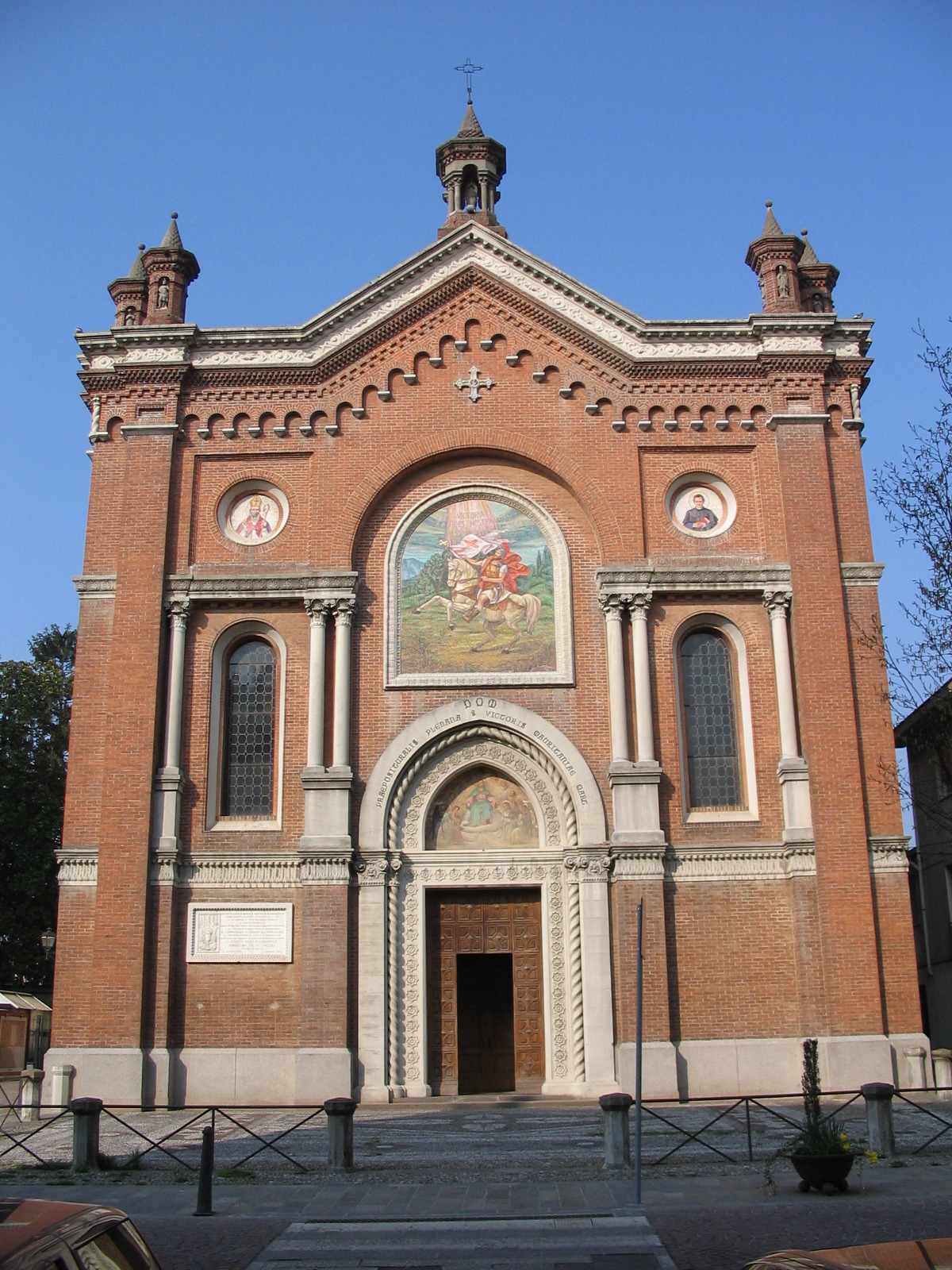 Autore Giorces. Terno d'Isola, Bg, parrocchiale S. Vittore martire.